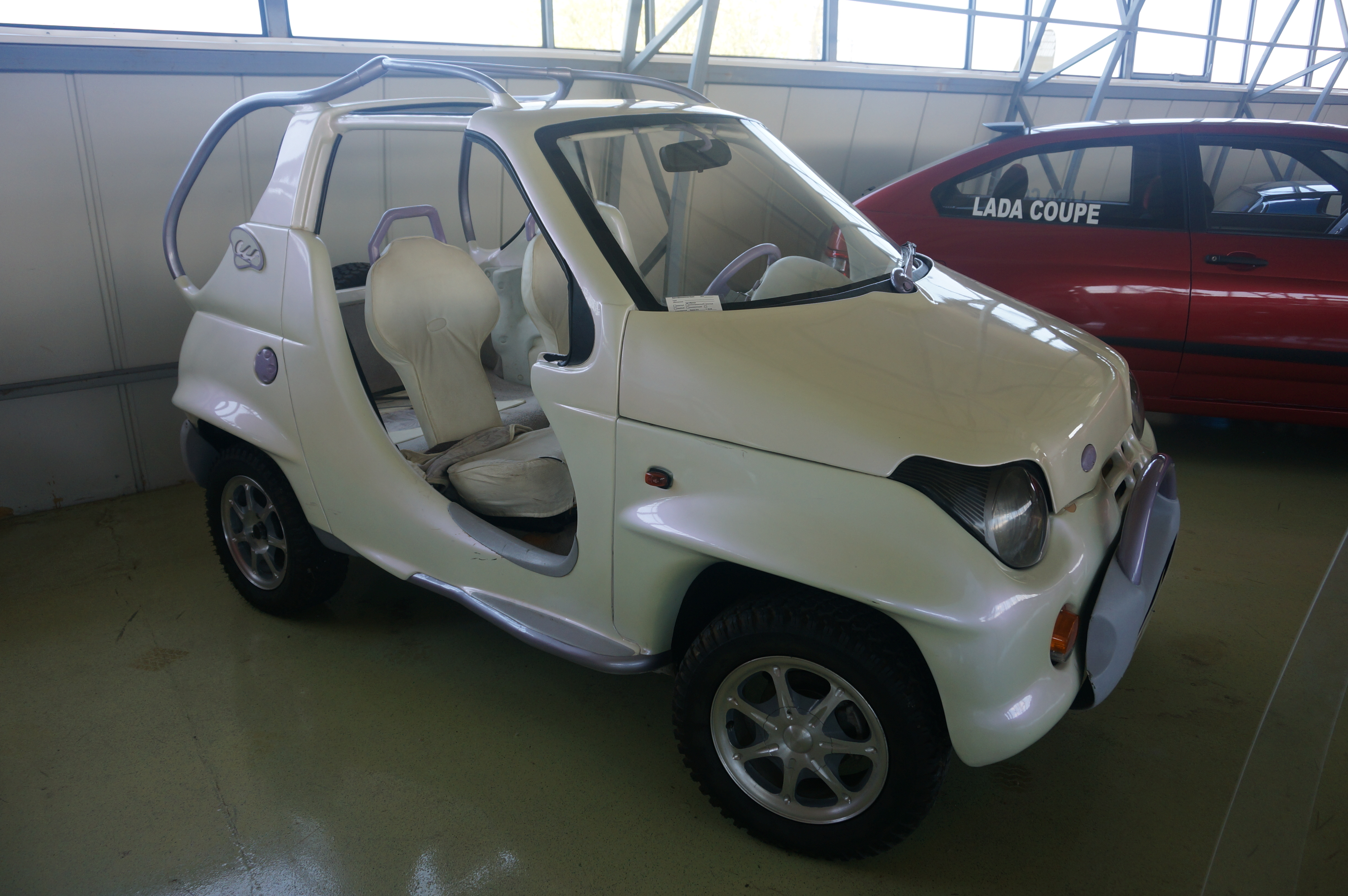 ВАЗ 1152 "Эльф". Концепт-кар для эксплуатации в местах отдыха и развлечений